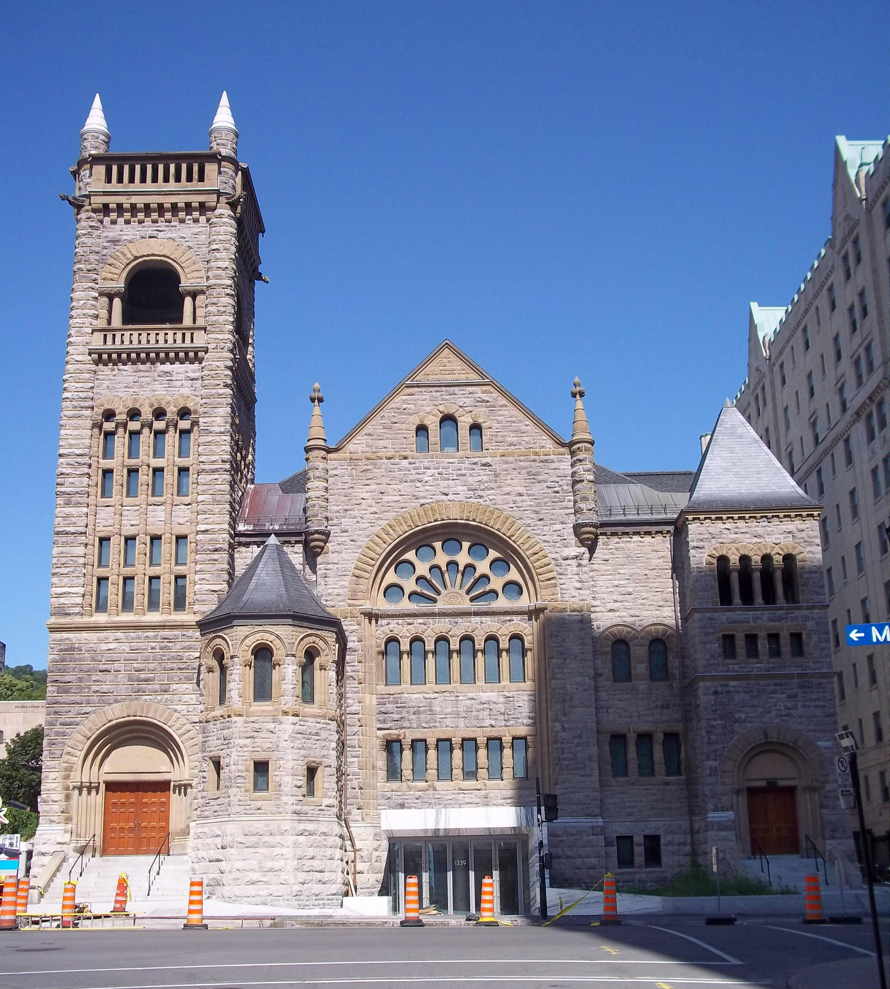 Eglise Erskine and American